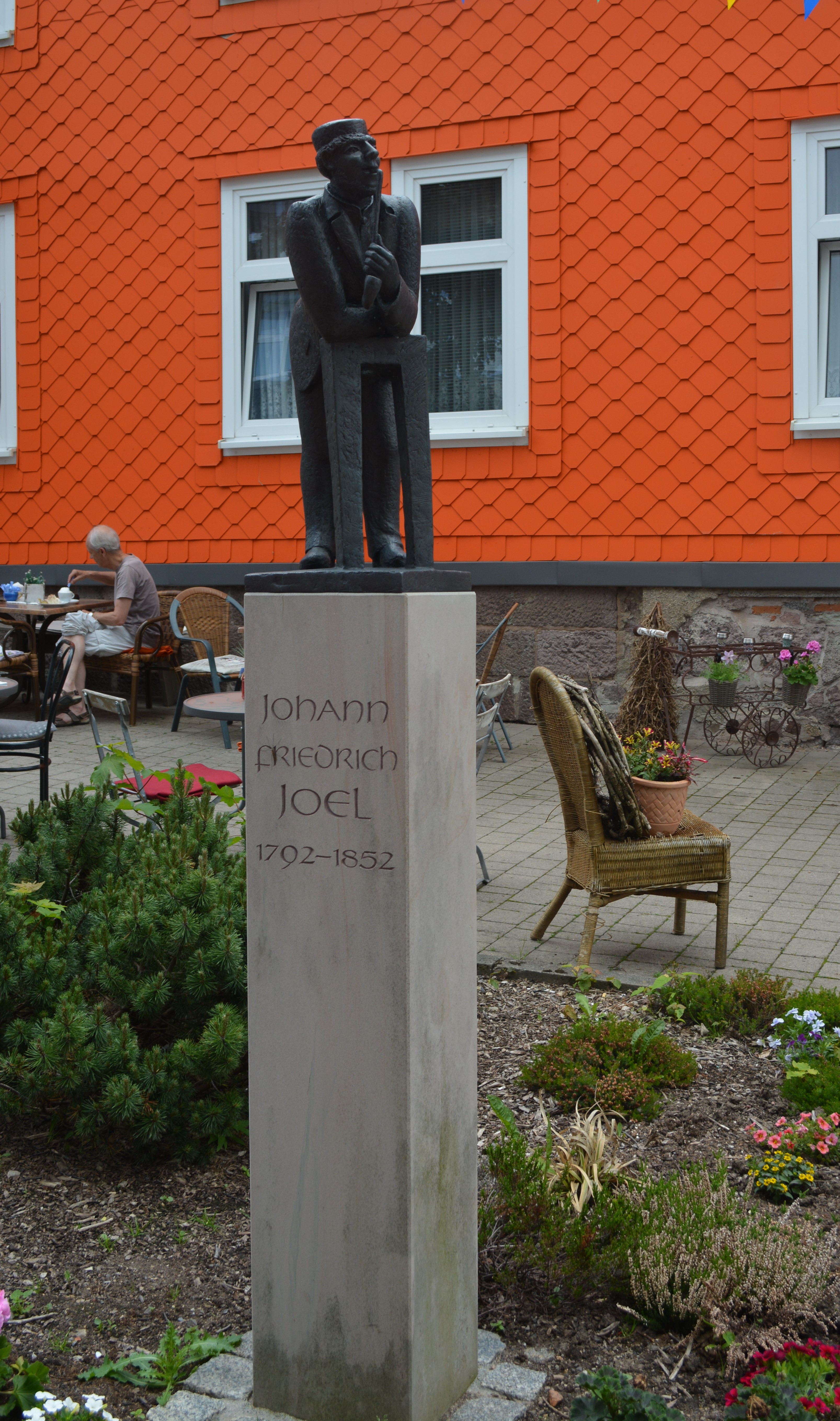 Skulptur in der Zellaer Straße Oberhof